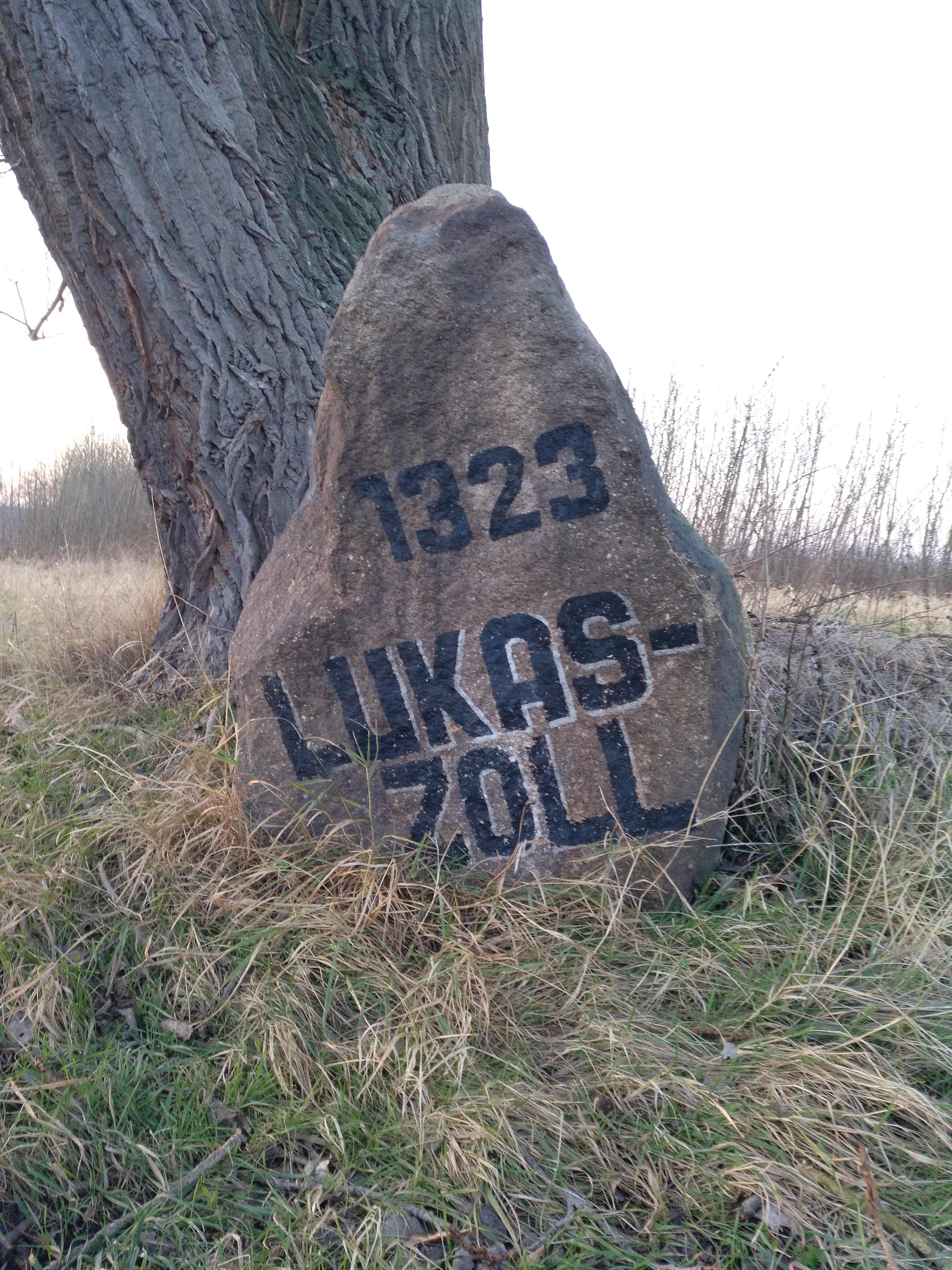 Gedenkstein zum „Lukaszoll“ südlich von Vienenburg.